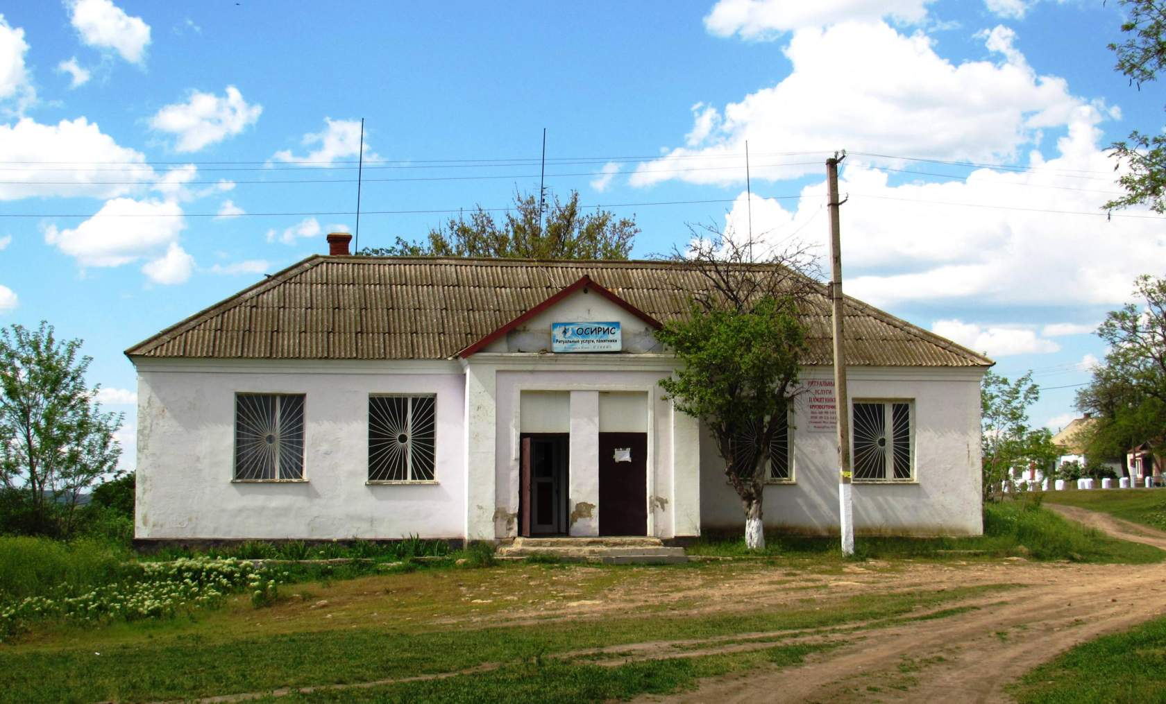 Сельмаг села Новоукраинка.